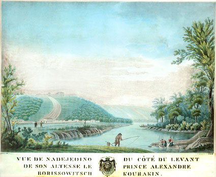 Vue du chateau de Nadejdino de S.A. le Prince A.B. Kourakine.